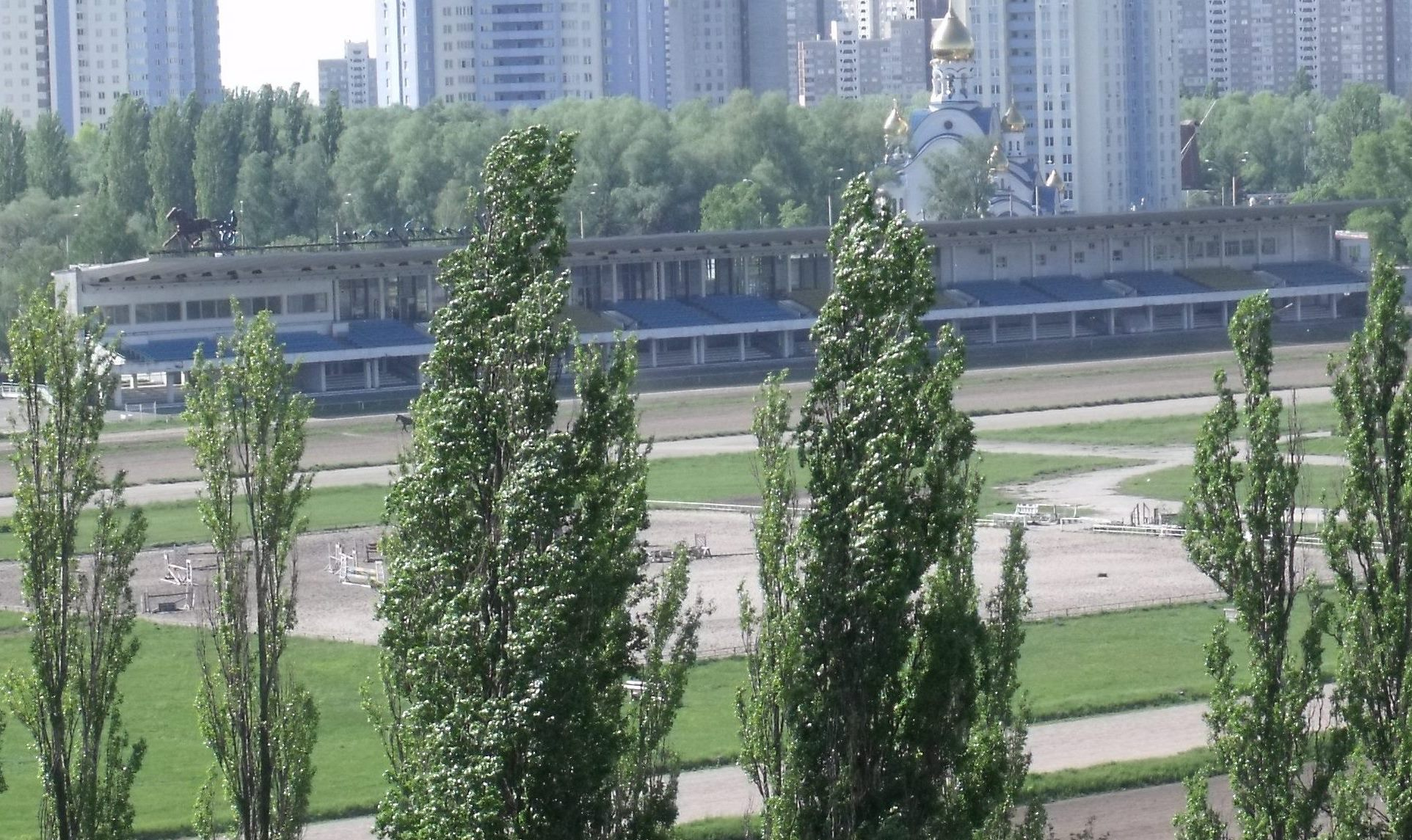 Київський іподром (трибуни), Голосіївський район, Теремки